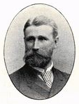 Gustaf von Segebaden (1852-1934)